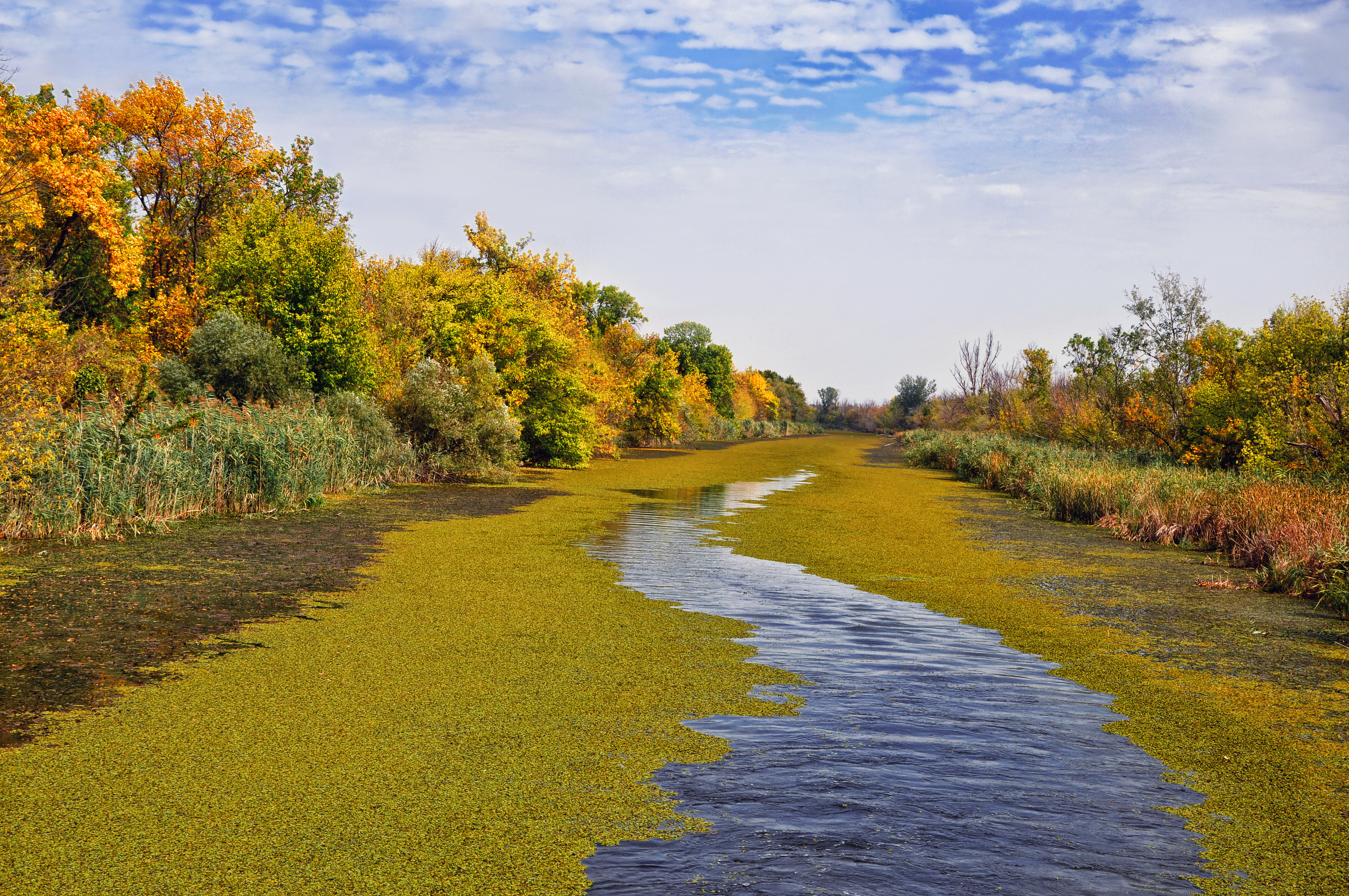 Ово је фотографија заштићеног природног добра у Србији под шифром: РП09 This is a a photo of a natural area in Serbia with ID: РП09